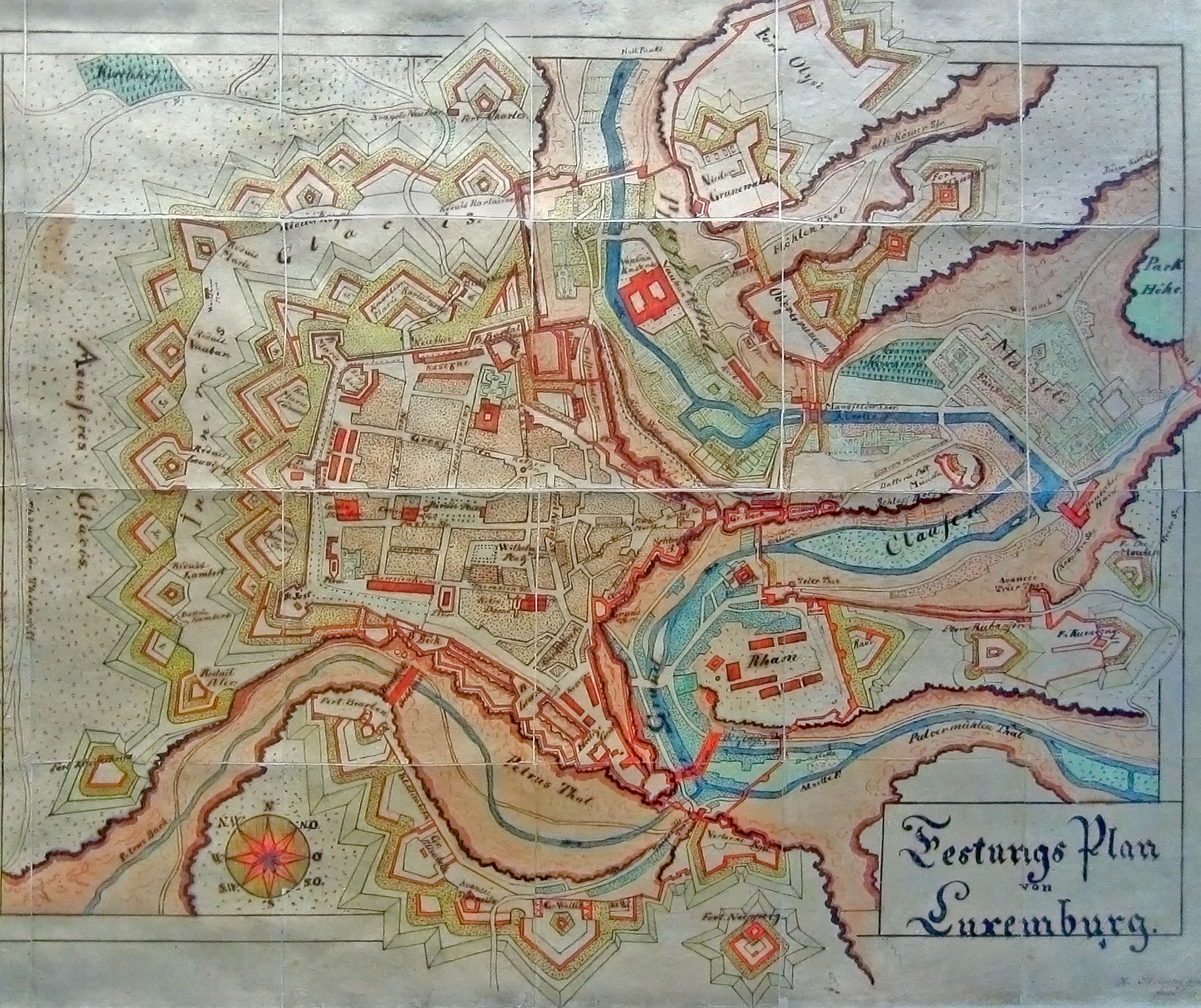 Festungsplan von Luxemburg im Militärhistorischen Museum der Bundeswehr in Dresden